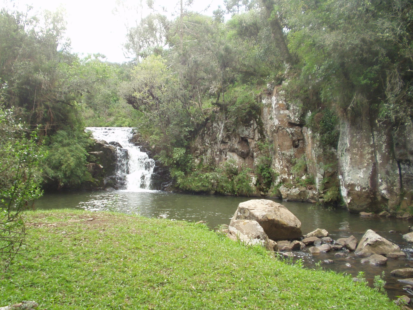 Lago na serra